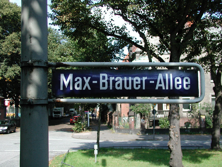 road sign Max-Brauer-Allee in Hamburg (Germany) // Schild Max-Brauer-Allee in Hamburg (Ecke Hospitalstraße)